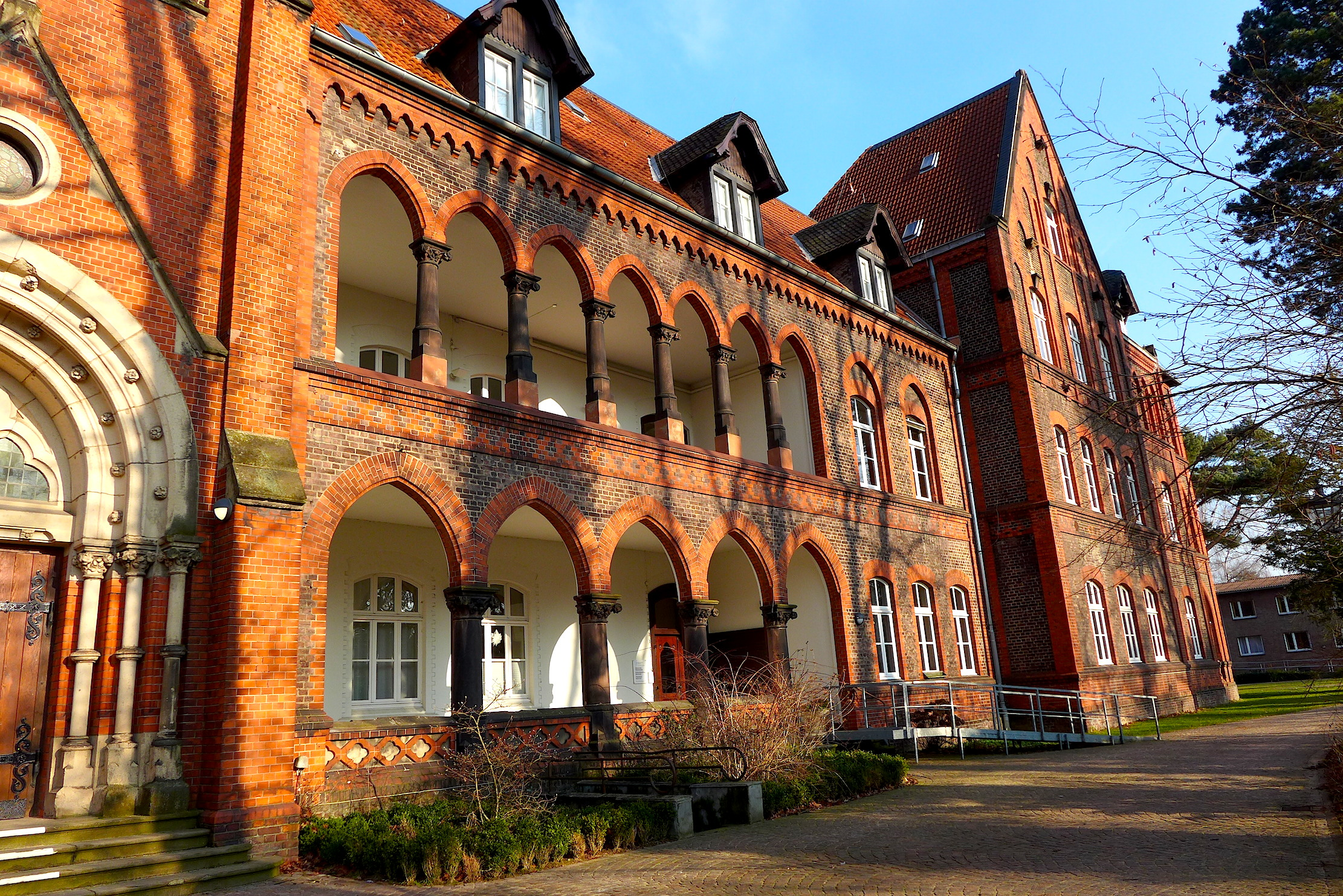 Евангелическая церковь в Диаконии Кайзерсверта (Дюссельдорф).